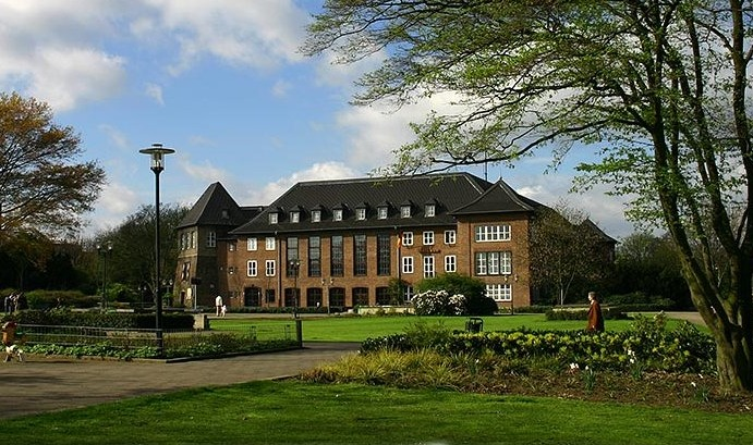 Burg Dinslaken, Nordost-Ansicht